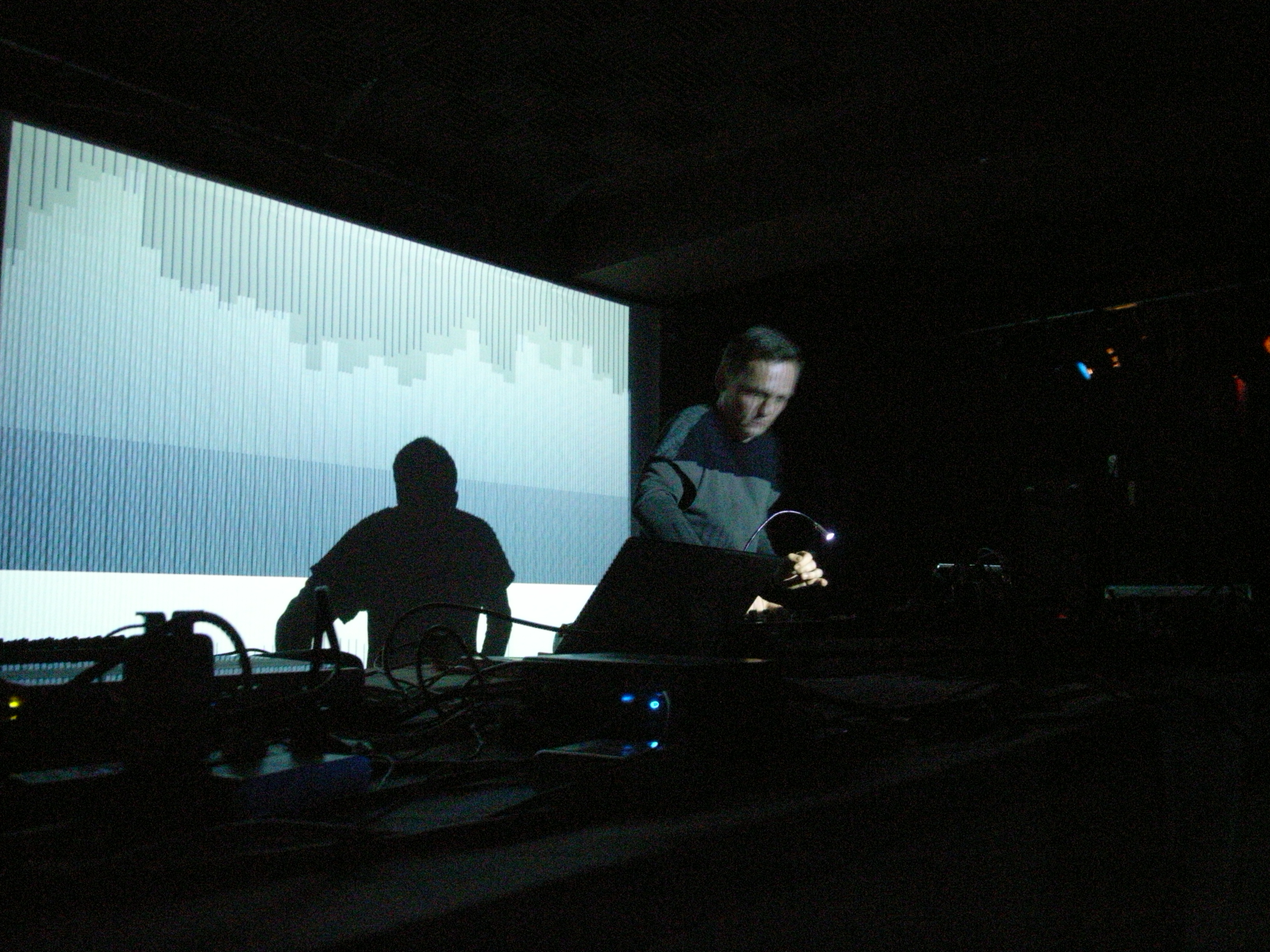 Alva Noto live in Osaka 2006